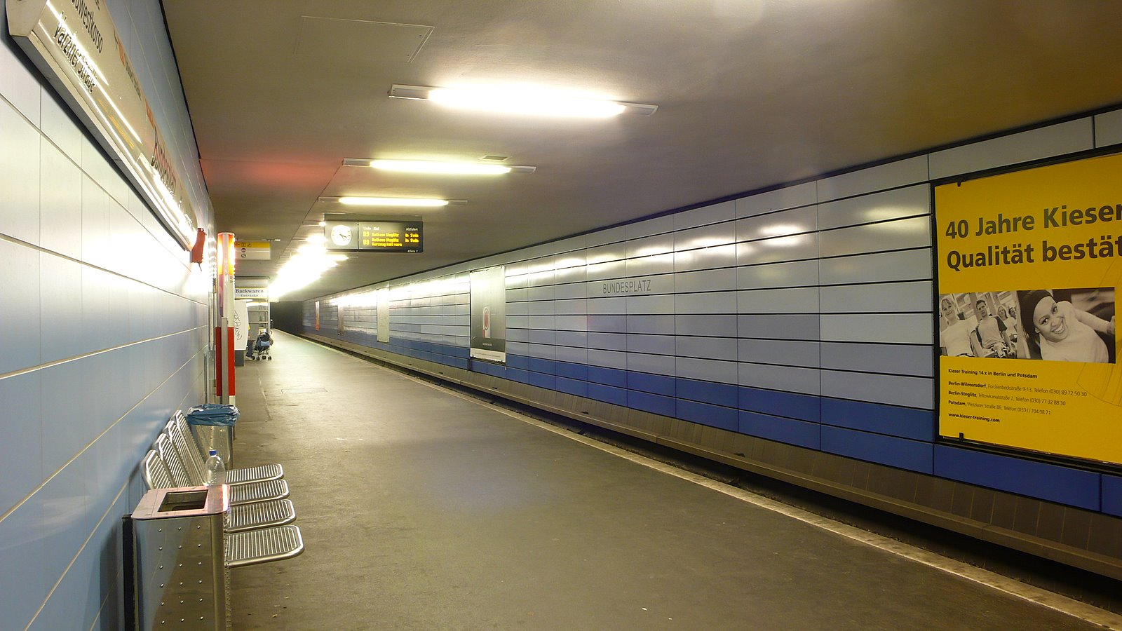 Bundesplatz UBahnhof Berlin